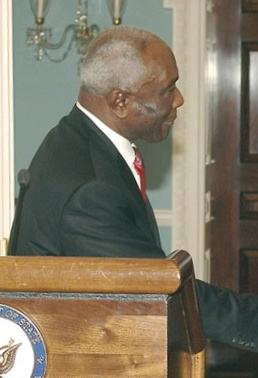 Jacques-Edouard Alexis and Condoleezza Rice.